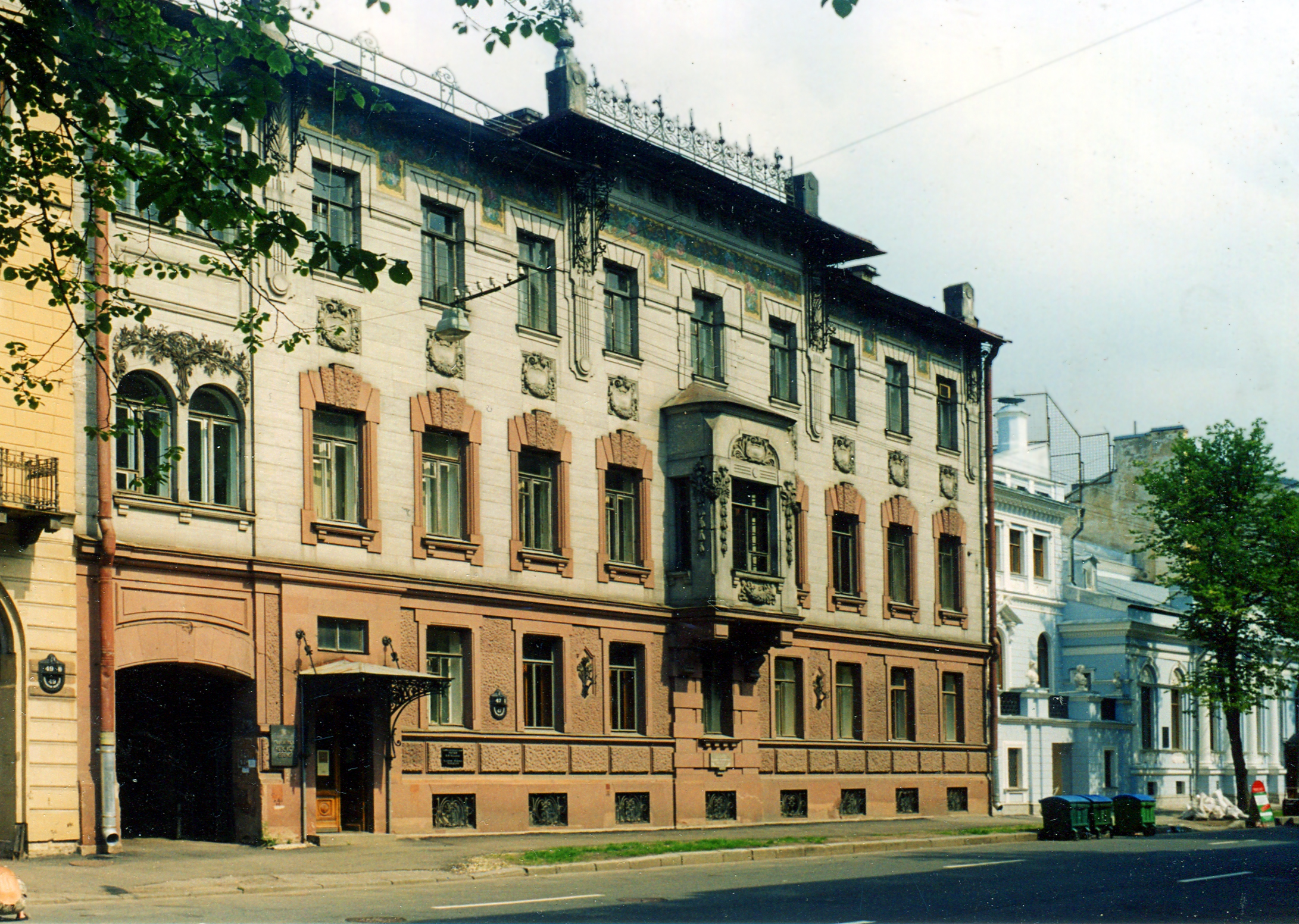 St-Petersburg._Nabokovs_house